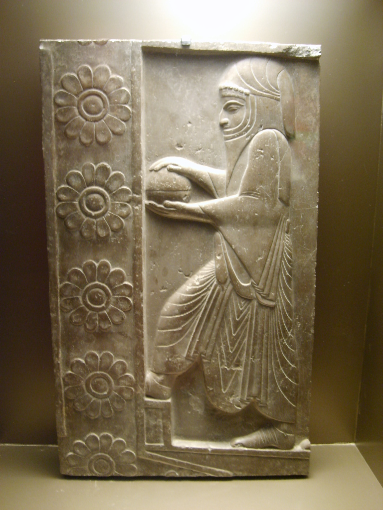 Persia: Fragmentos del Paraíso, exposición en la ciudad de México.